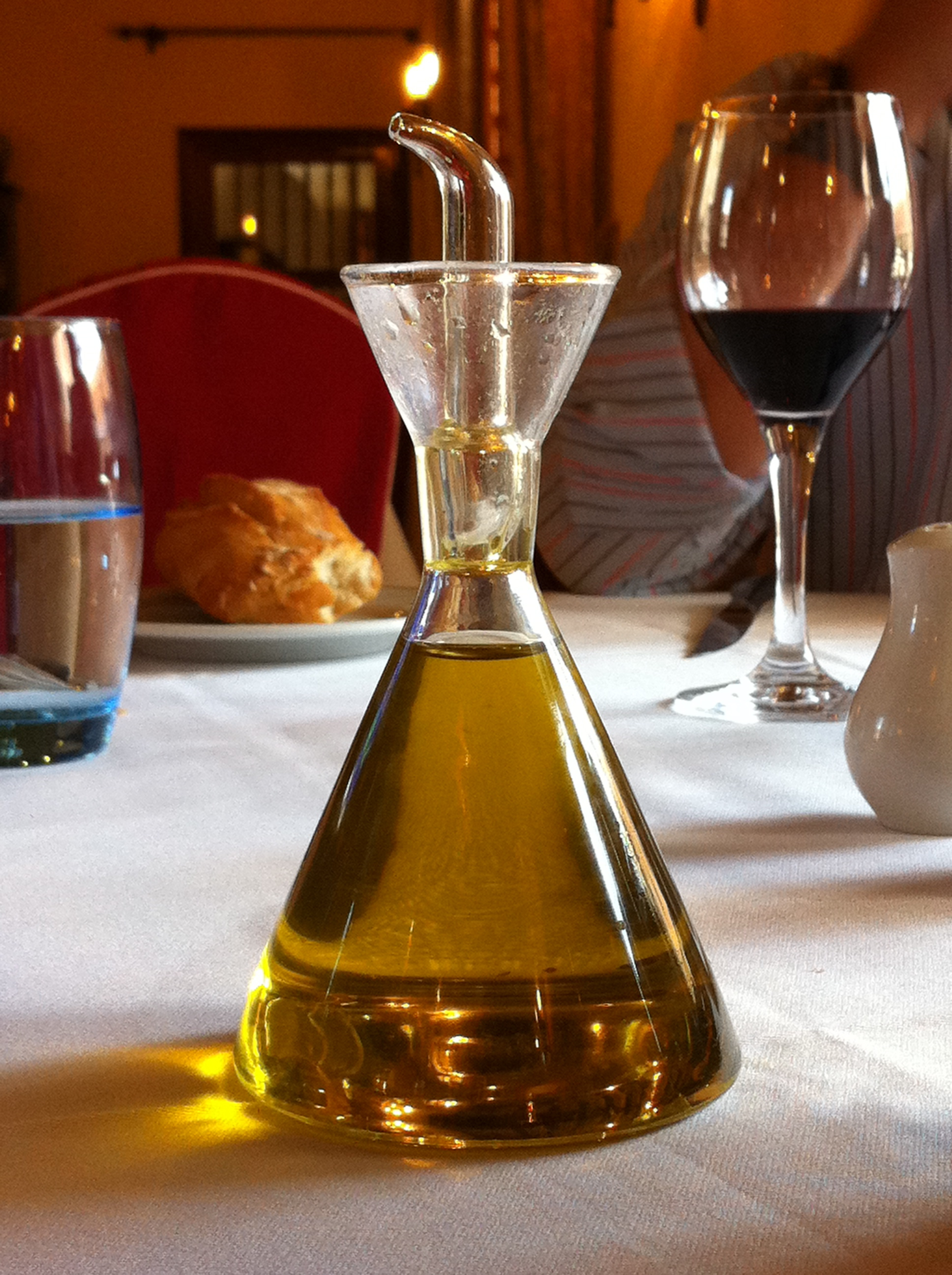 Aceitera